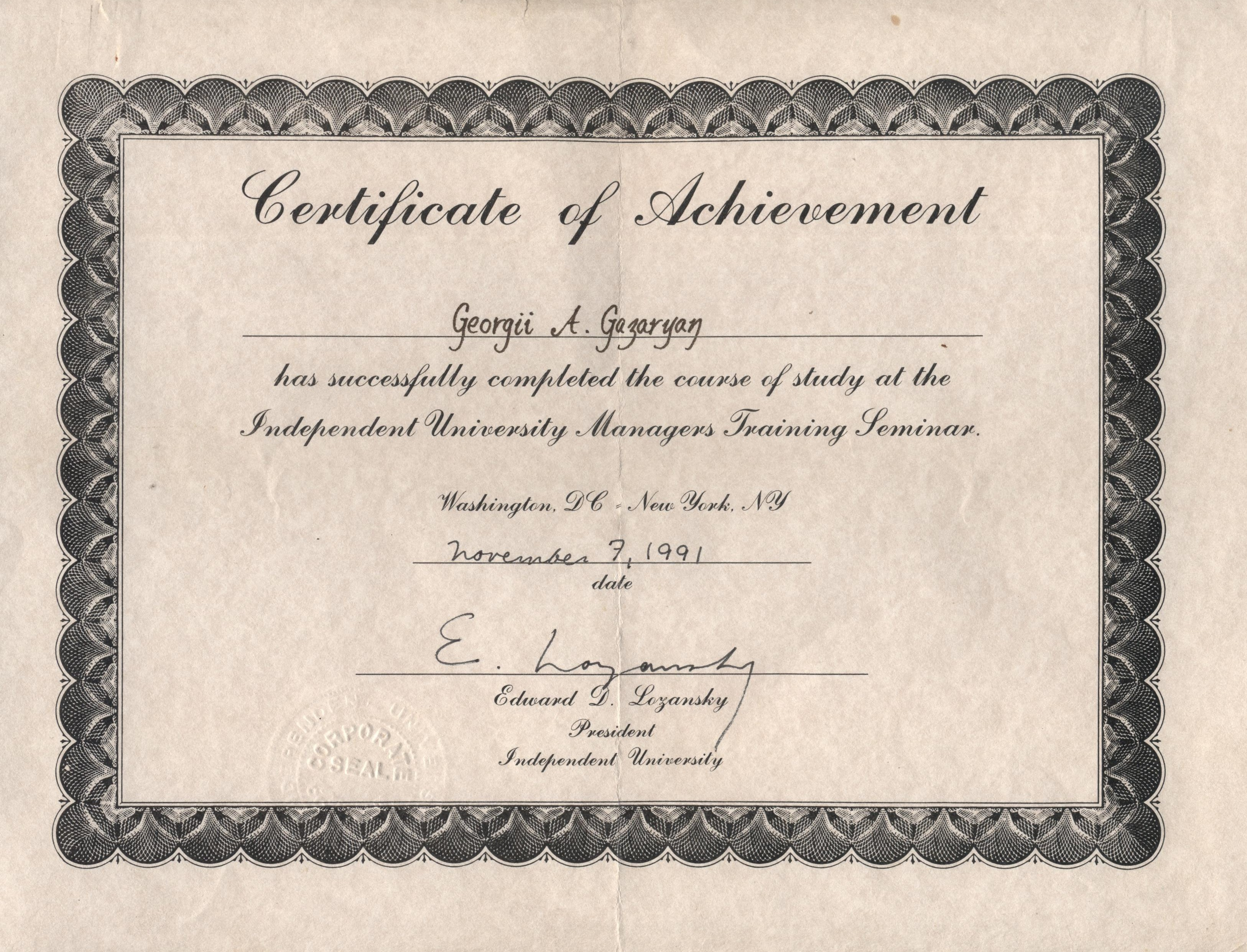 Курсы обучения на семинаре по подготовке менеджеров в университете Эдварда Лозенского